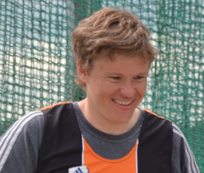 Manuela Montebrun au 1er tour des interclubs disputés à Laval le 5 mai 2013